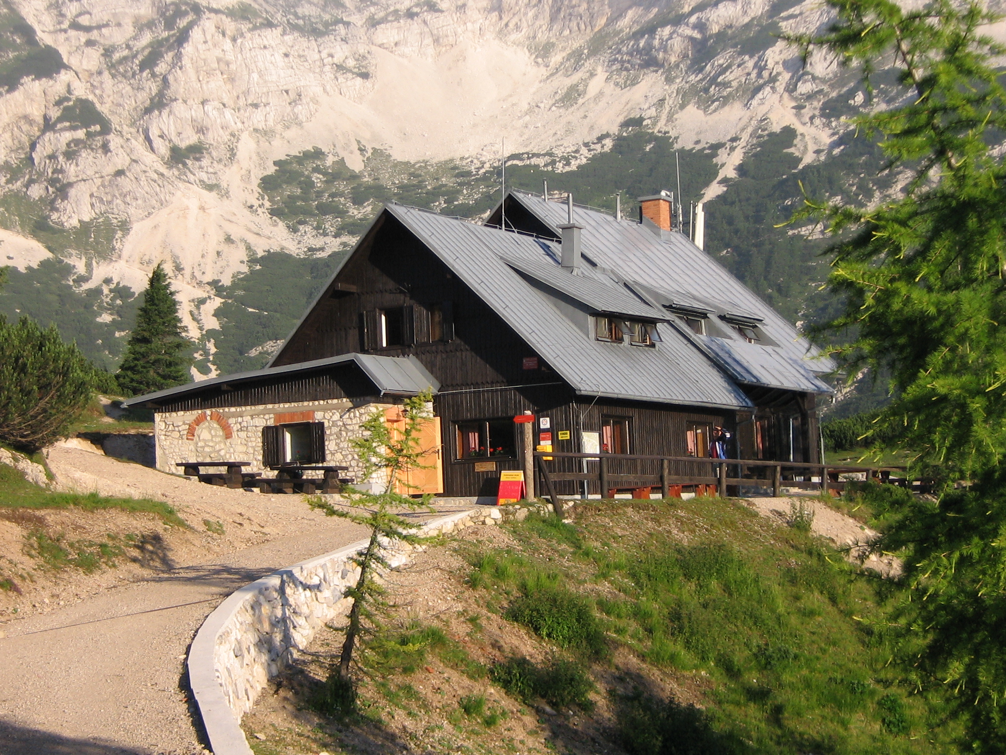 Poštar-Haus (1725m) auf dem Vršič-Pass